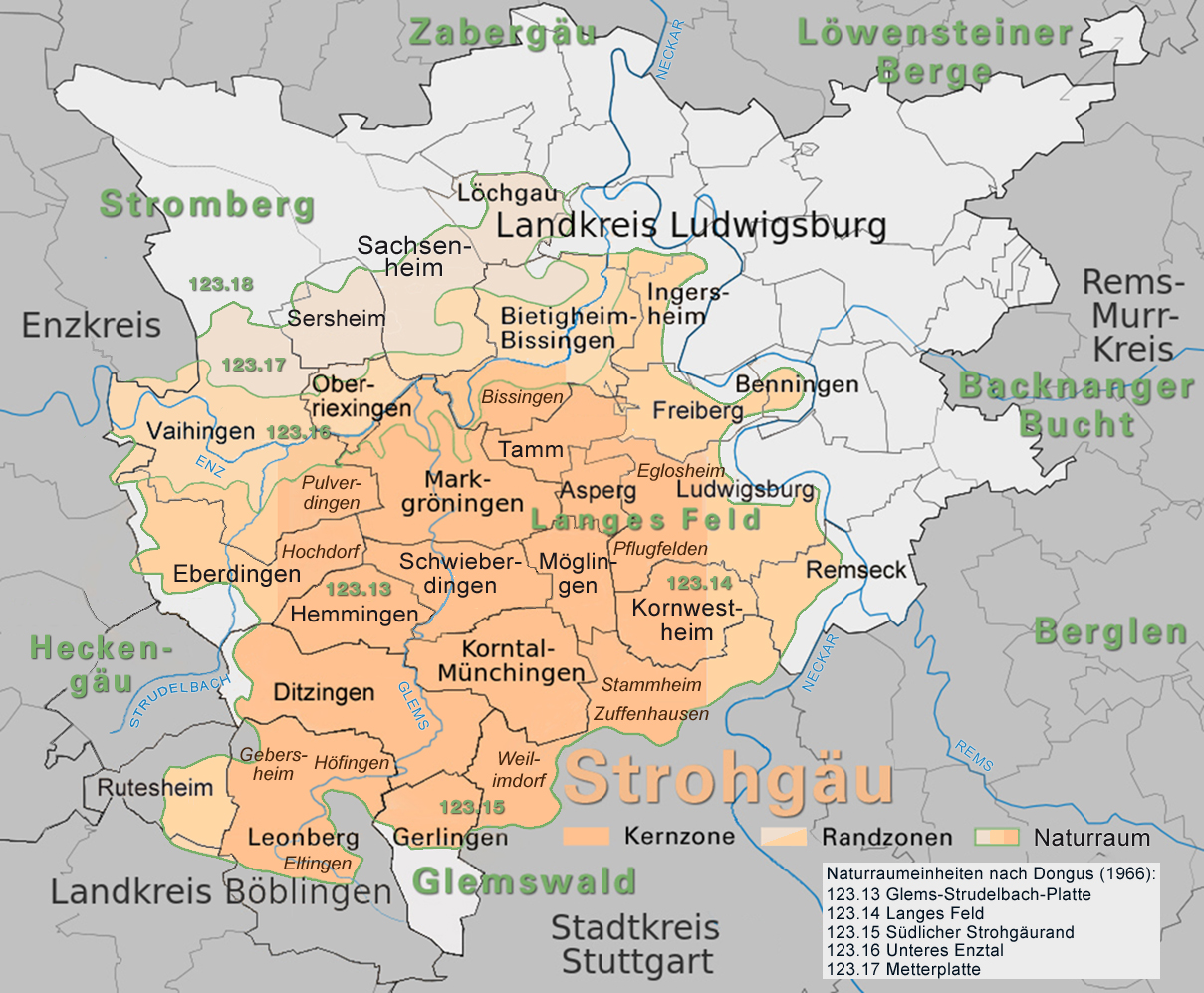 Landkreiskarte zur Abgrenzung des Strohgäus: Kernzone zwischen Leonberg und Ludwigsburg gemäß regionaler Identität zuzüglich Randbereichen gemäß Naturraumeinheiten nach H. Dongus (Stuttgart 1966)